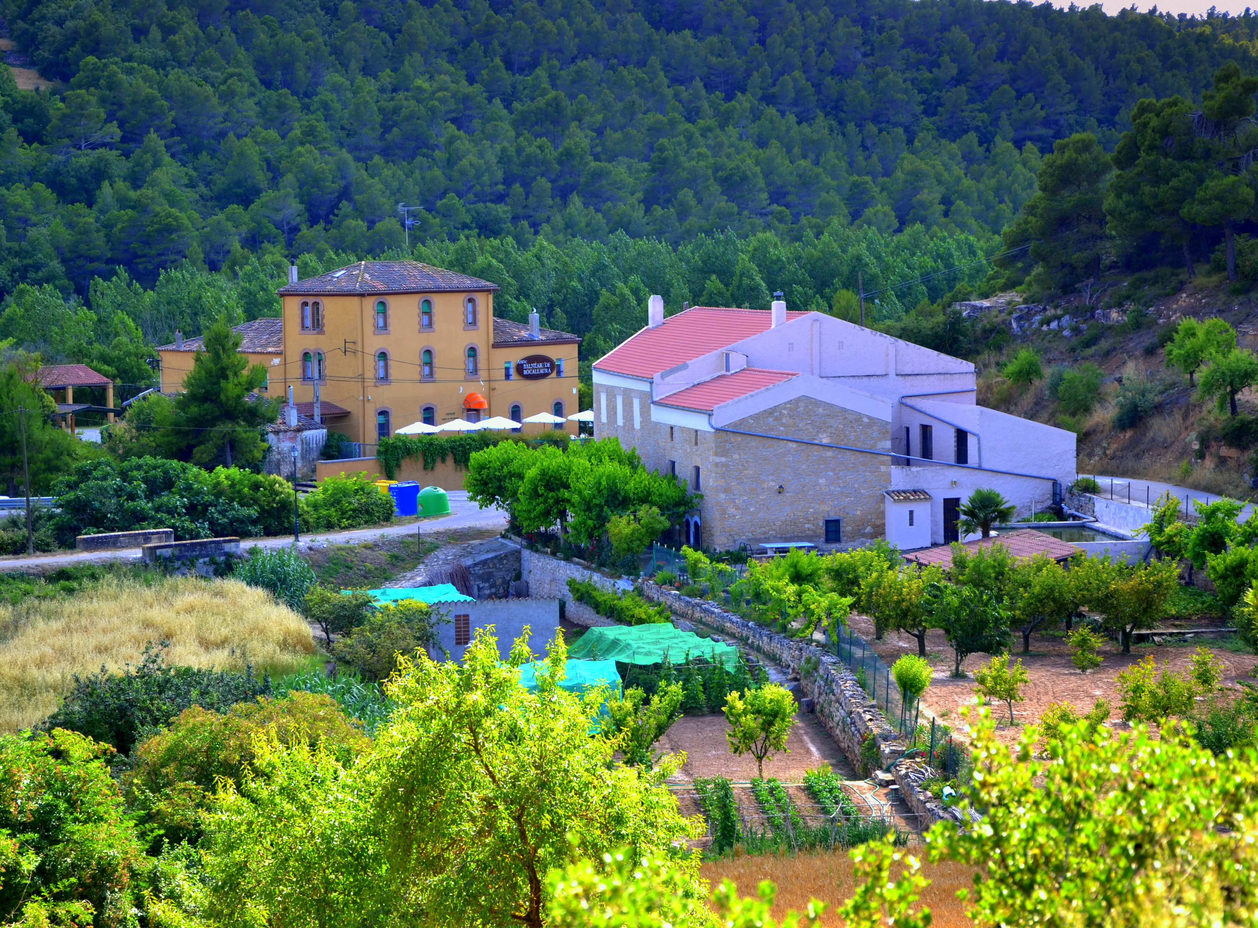 Balneari Aigua de Rocallaura (Vallbona de les Monges)